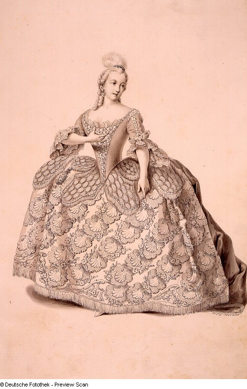 Faustina Bordoni als Attilia in der Oper "Attilio Regolo" von Johann Adolph Hasse. Hoftheater Dresden, Uraufführung 12. Januar 1750. Federzeichnung von Francesco Ponte In: Vestiarium der Oper "Attilio Regolo". Dresden: Kupferstich-Kabinett Ca 103 Blatt 2